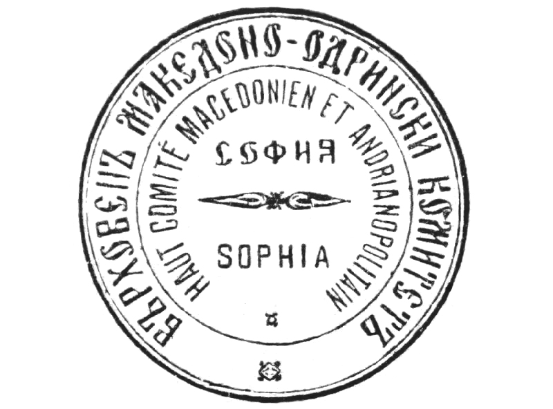 Печат на Върховния македоно-одрински комитет.